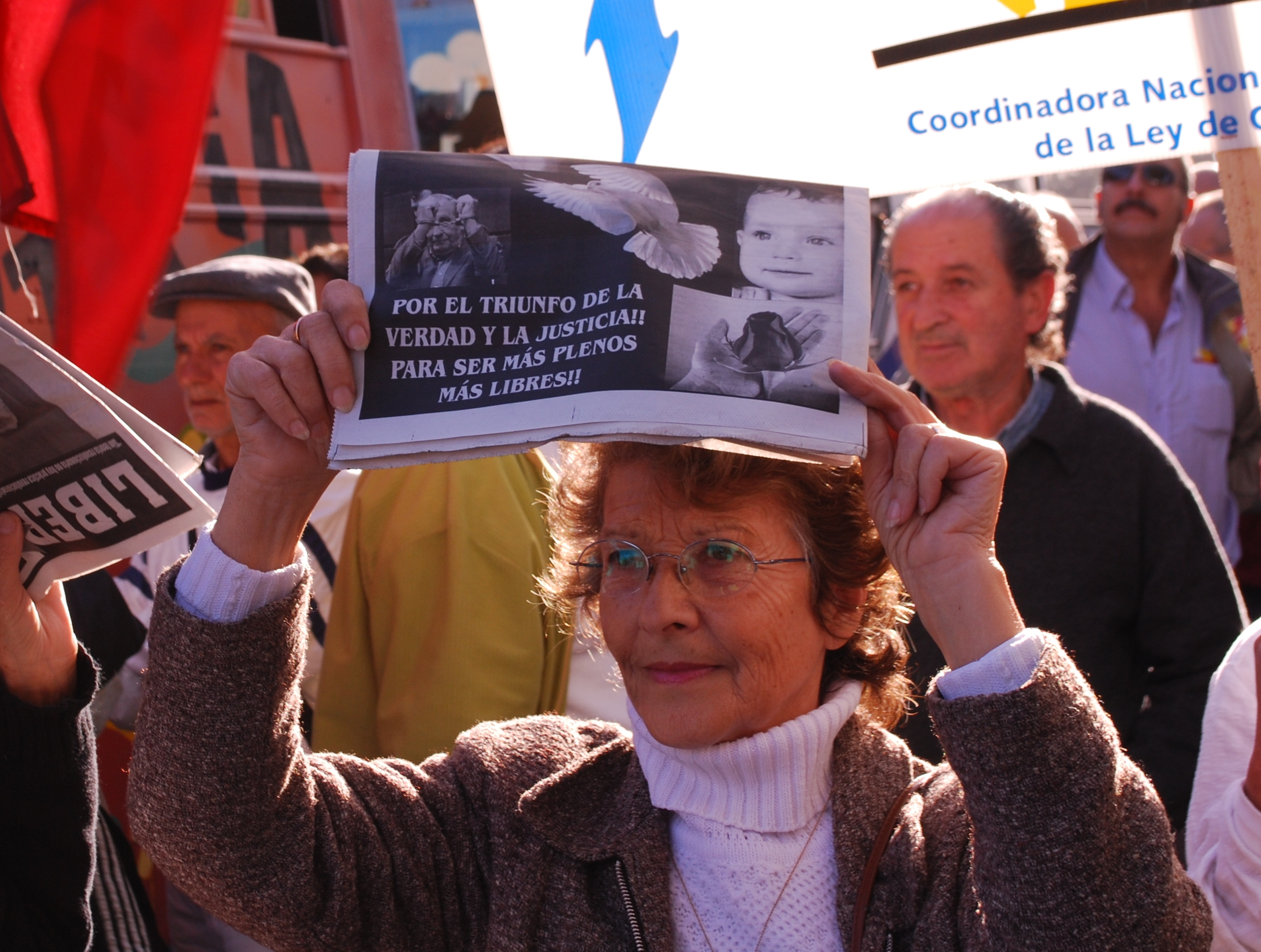 Fotografía de una militante por la anulación de la Ley de Caducidad (Uruguay), en el acto de entrega de las papeletas firmadas al Parlamento.